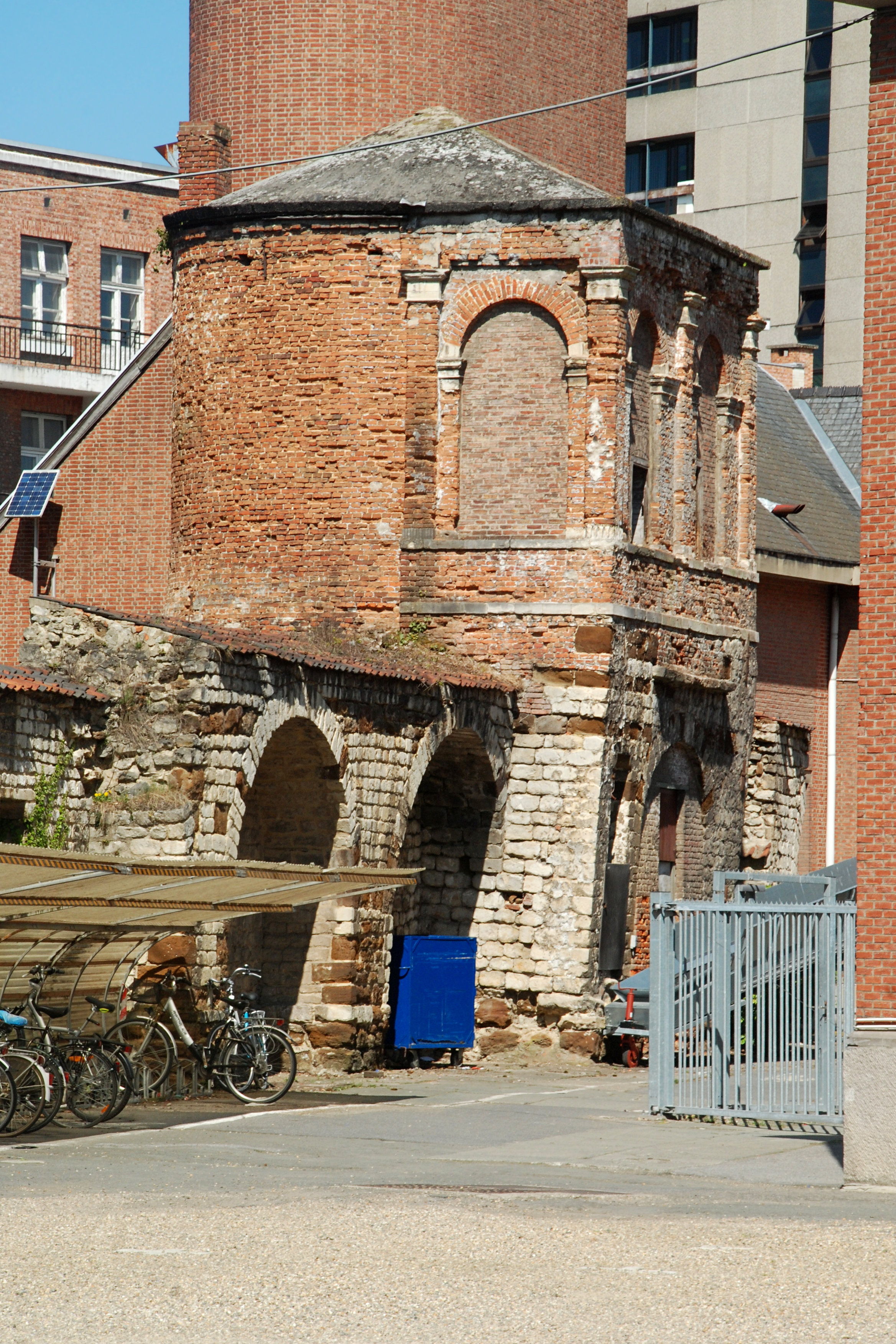 Belgique - Brabant flamand - Louvain - Première enceinte de Louvain - tour située sur le terrain des hôpitaux universitaires Saint-Pierre et Saint-Raphaël